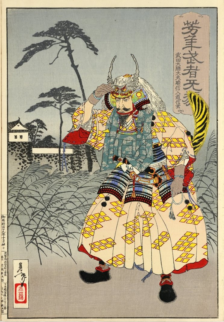 武田大膳大夫晴信入道信玄 月岡芳年画「芳年武者无類」